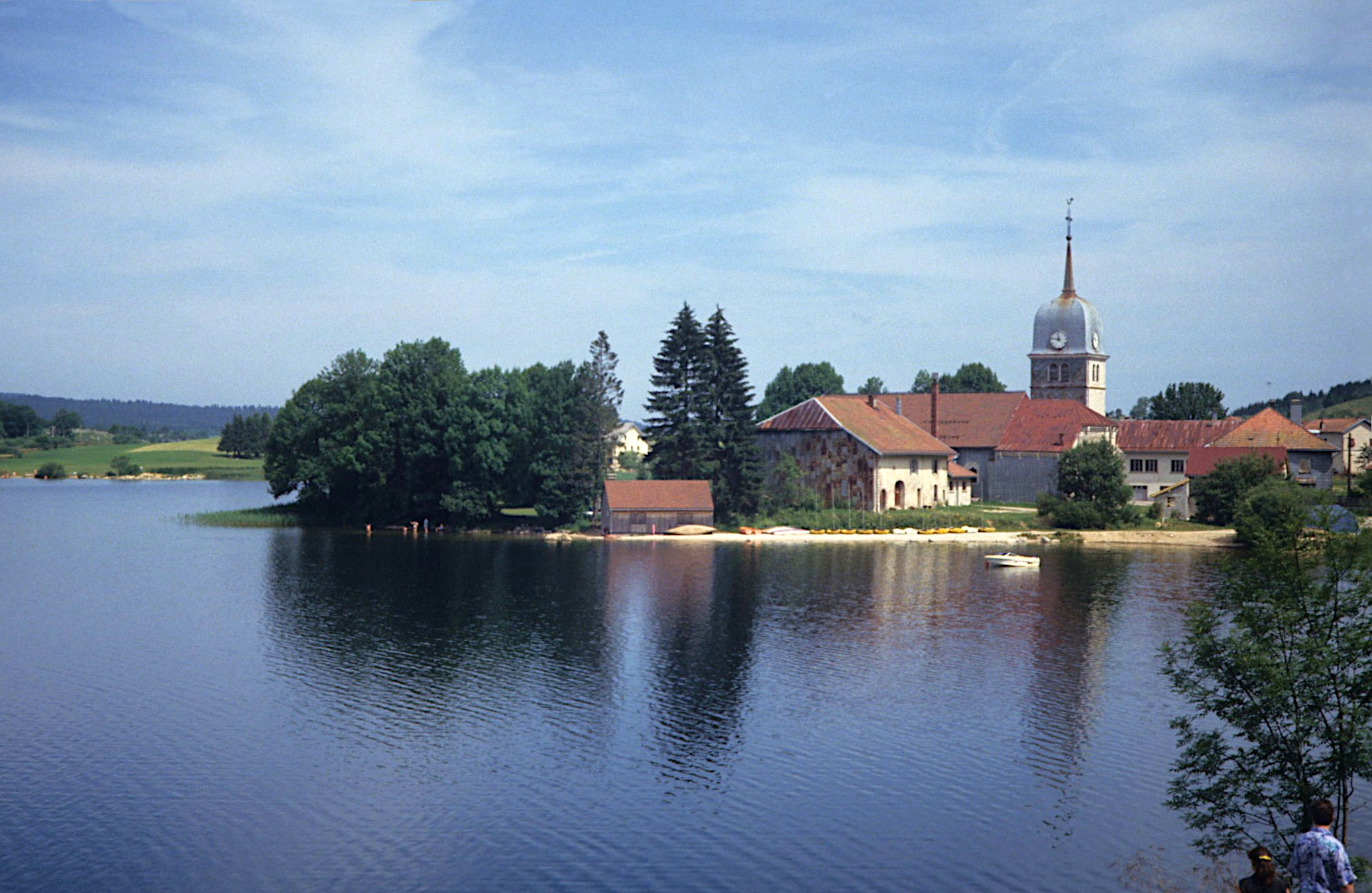 L'abbaye de Grandvaux et le lac de l'Abbaye